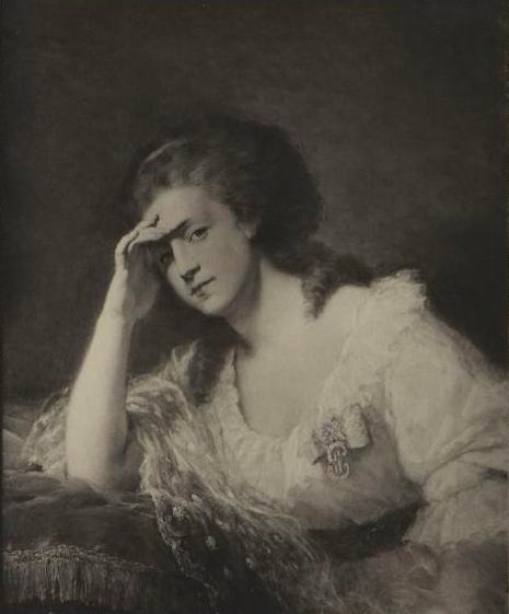 Екатерина Александровна Зиновьева, ур. Меншикова (1748—1781)